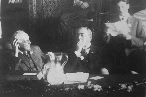 הלורד ארתור ג'יימס בלפור (משמאל) בגימנסיה הרצליה בעיר תל אביב, יחד עם ראש עיריית תל אביב מאיר דיזנגוף